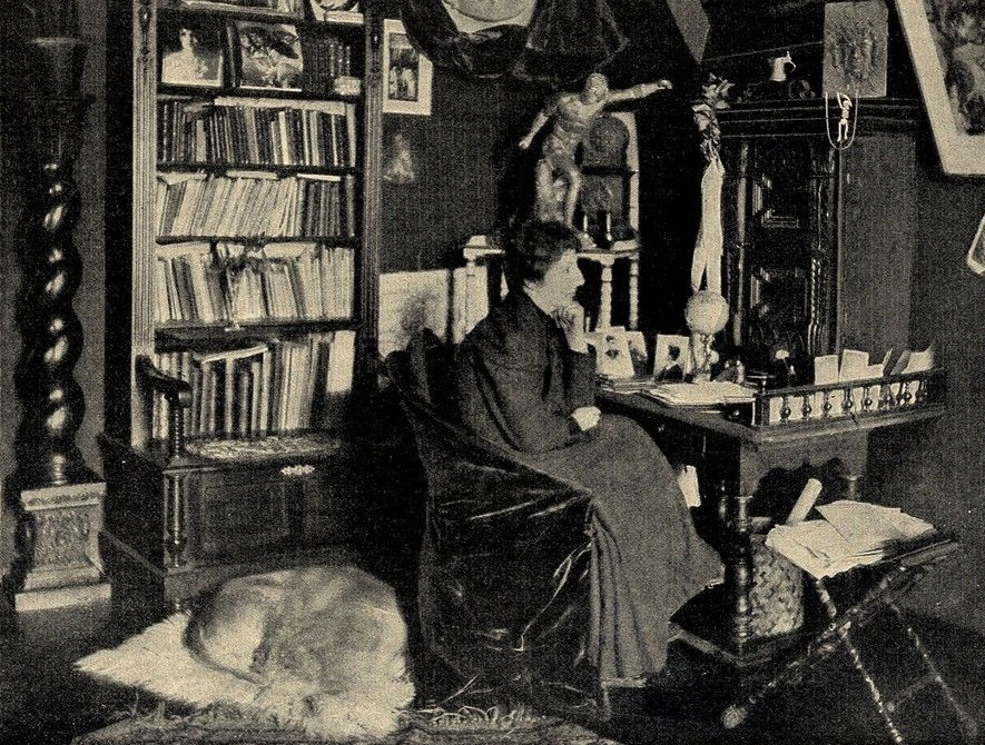 Dr. jur. Anita Augspurg in ihrem Münchener Hause. Spezialaufnahme für Die Woche, 1899